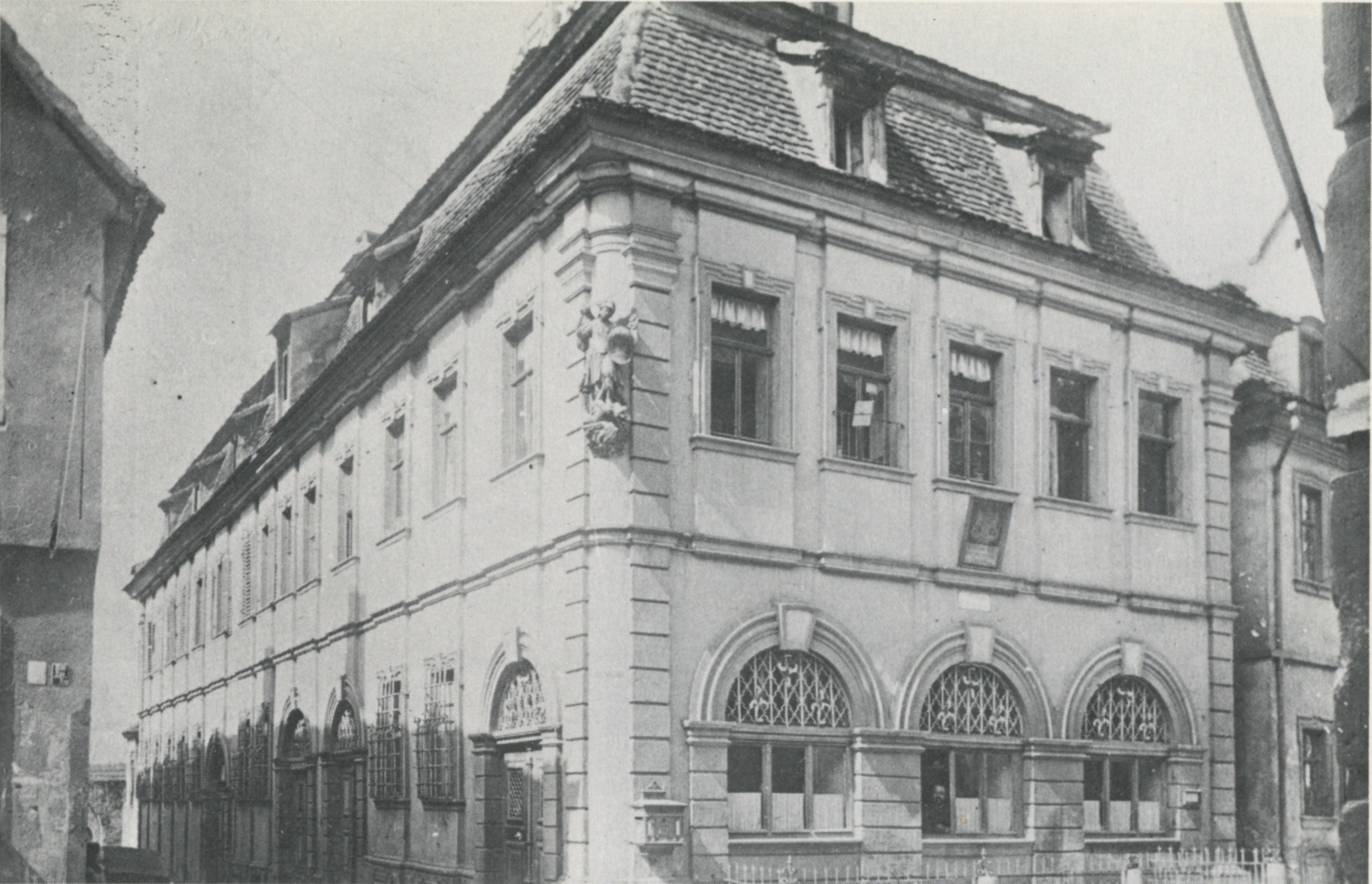 Fotografie der ehemaligen Kellerei bzw. des Postamtes in der Volkacher Hauptstraße vor 1912.